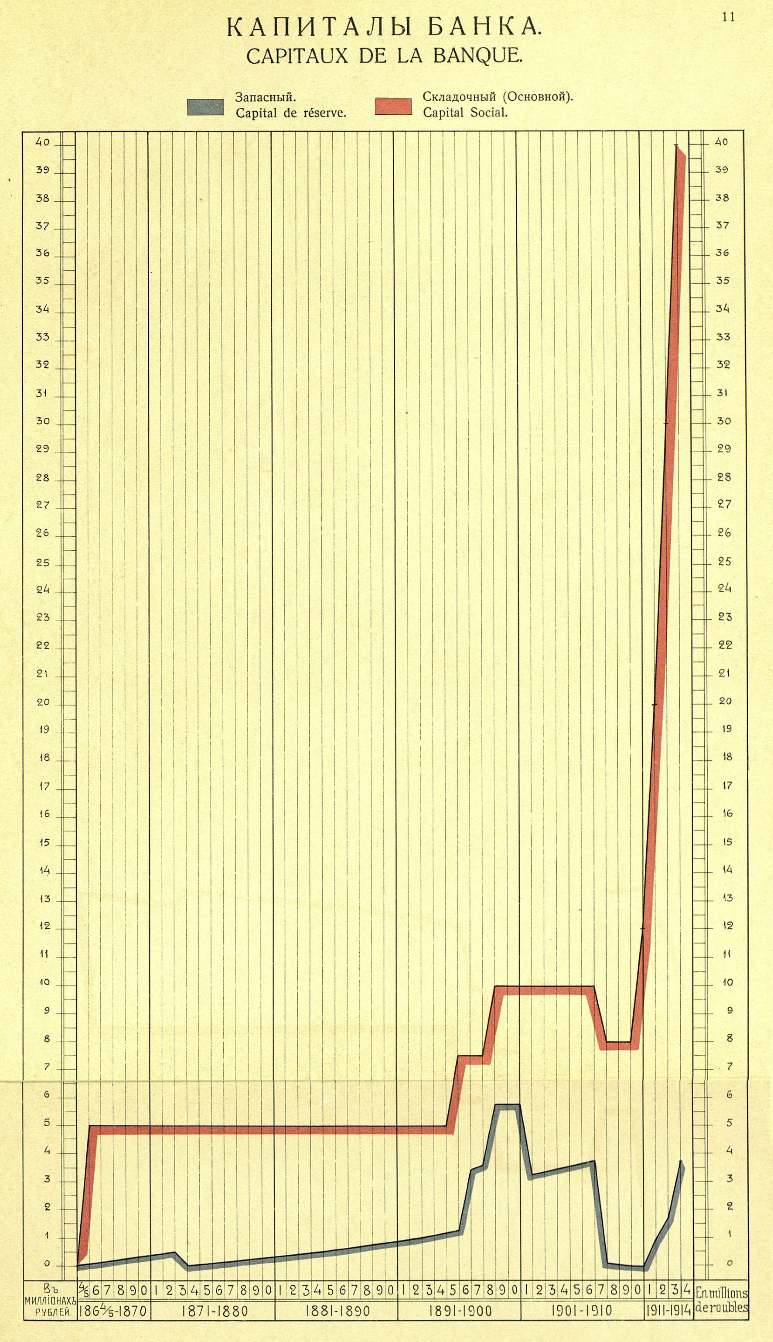 Капиталы Санкт-Петербургского частного коммерческого банка, 1864-1914